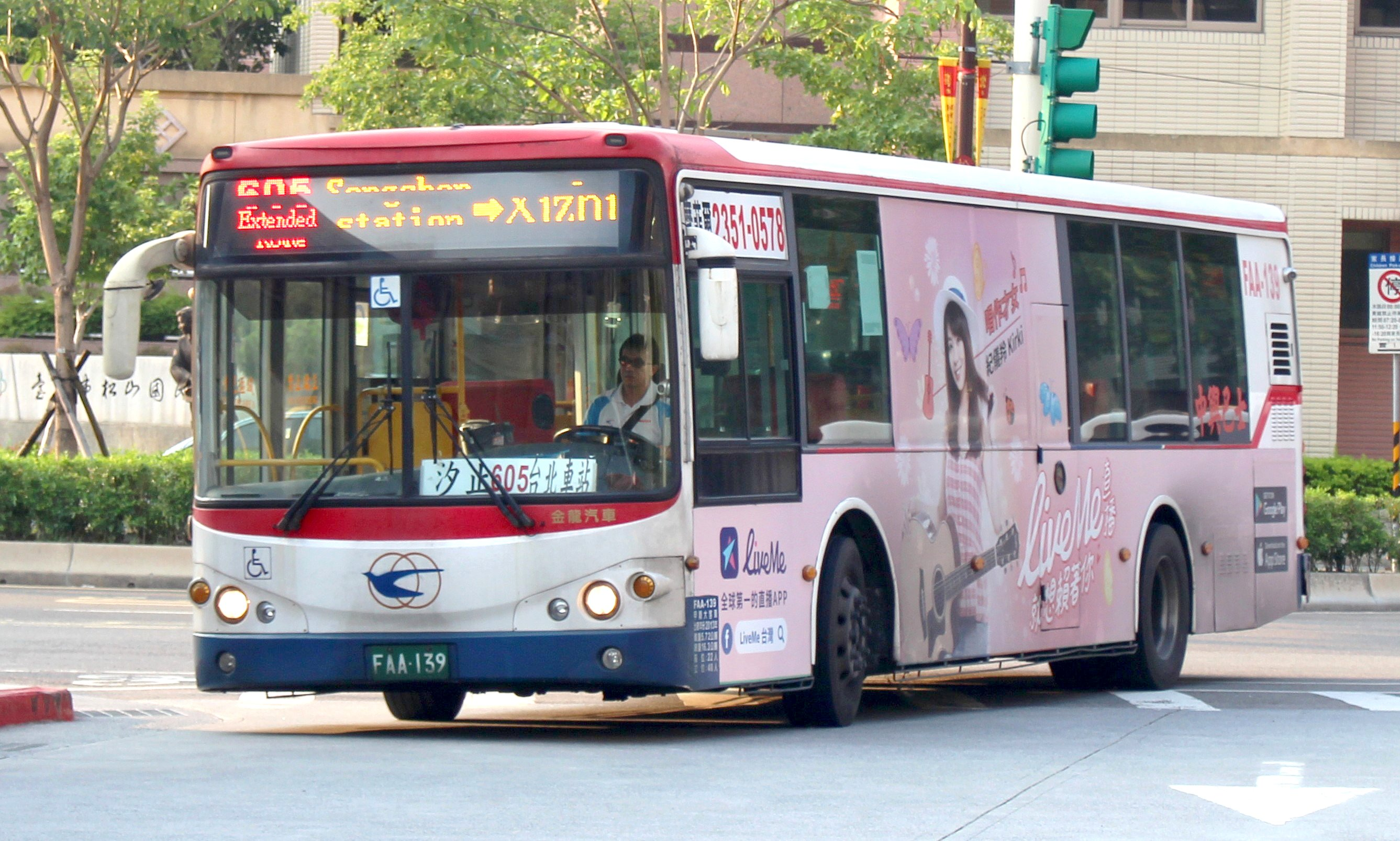 中興巴士FAA-139 605副線